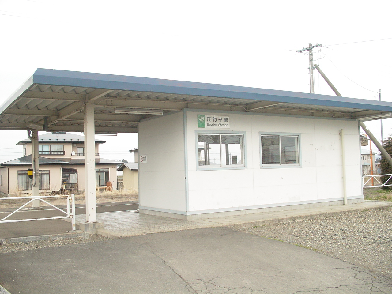 （江釣子駅）